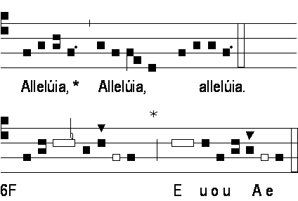 Alléluia pascal des Vêpres pour le Samedi